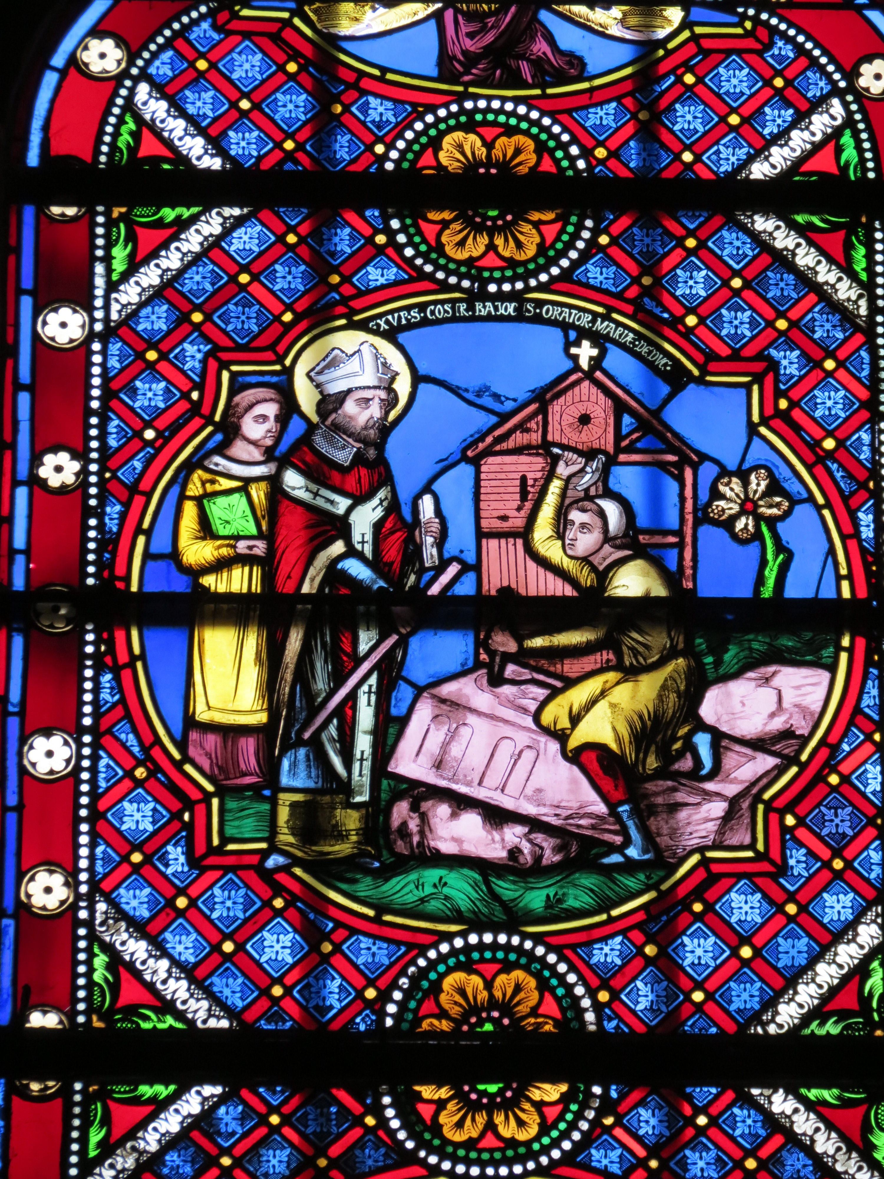 Saint Exupère, premier évêque de Bayeux. Vitrail vers 1848 par Thevenot dans la chapelle Saint-Julien et Saint-Exupère.